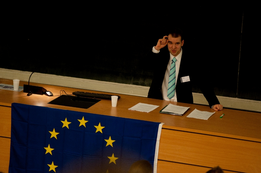 Komisja na MEU